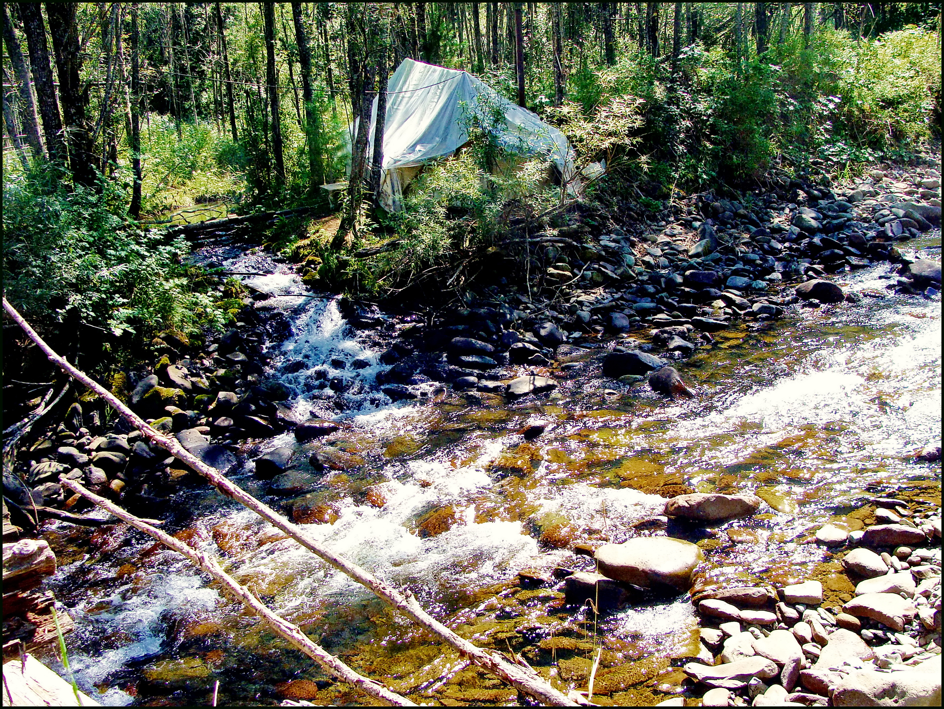 Характер формирования руслового аллювия в горной реке с невыработанным продольным профилем в межень. Хорошо видно, что происходит активное вымывание мелких частиц и формирование сортированного грубовалунного и глыбового аллювия. Река Самыш, август 2009, Алтай.